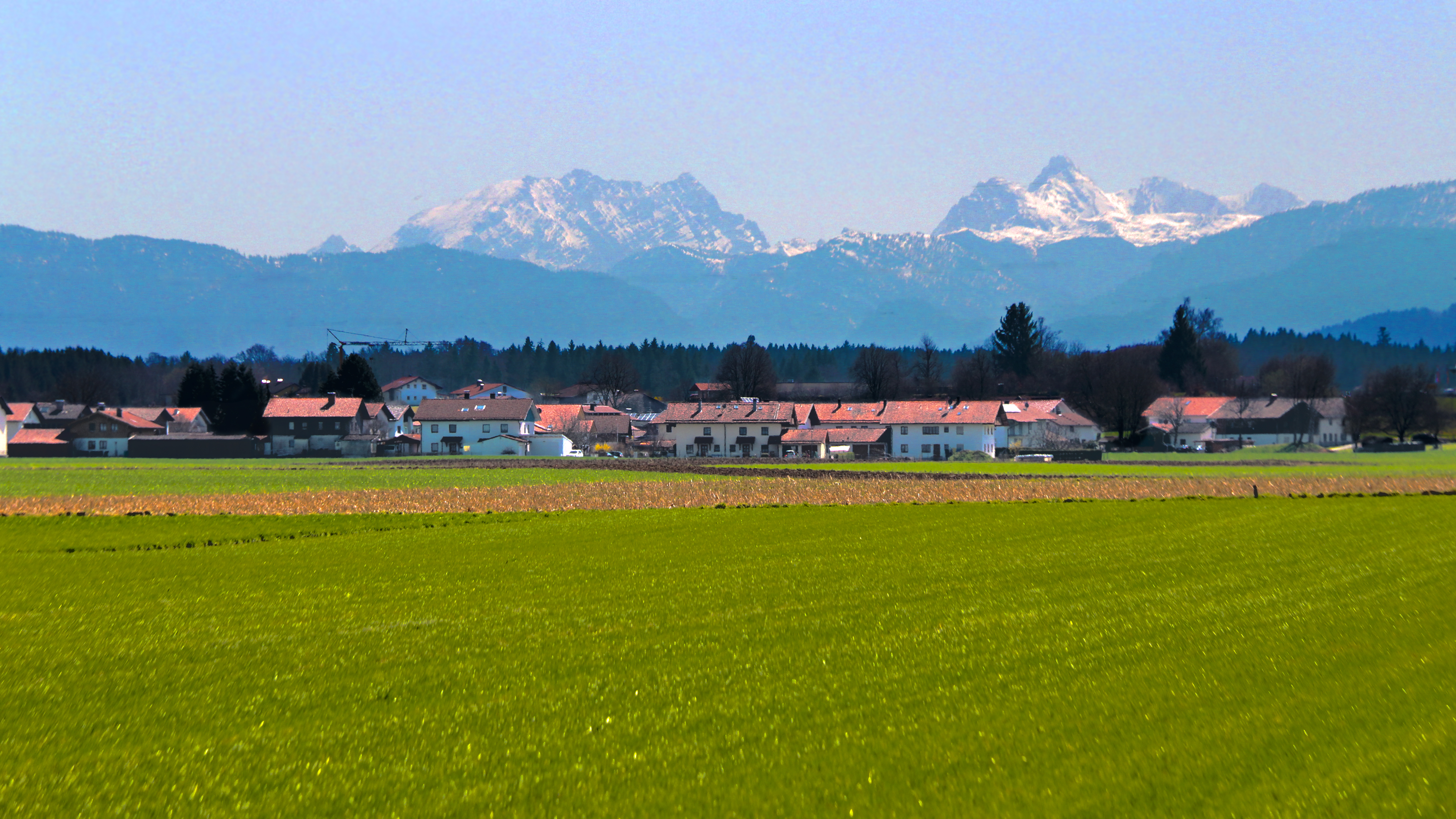 Aiging im Chiemgau mit den Alpen im Hintergrund von Herbstdorf aus gesehen.